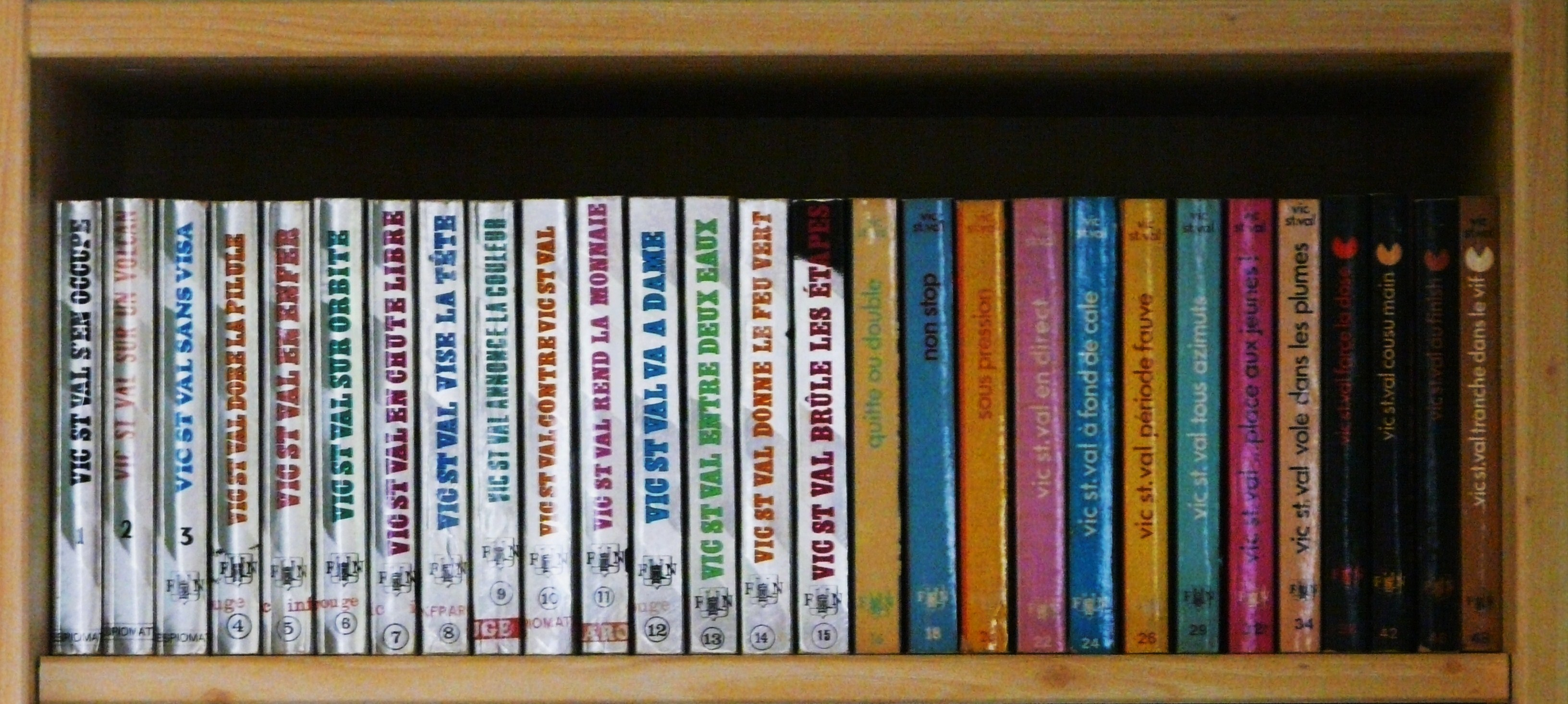 Les 28 premiers romans de Vic St Val, éditions Fleuve noir.